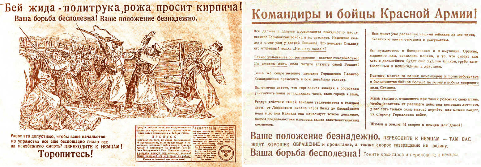 «Бей жида - политрука, рожа просит кирпича!» — лозунг и агитационная листовка нацистской Германии.